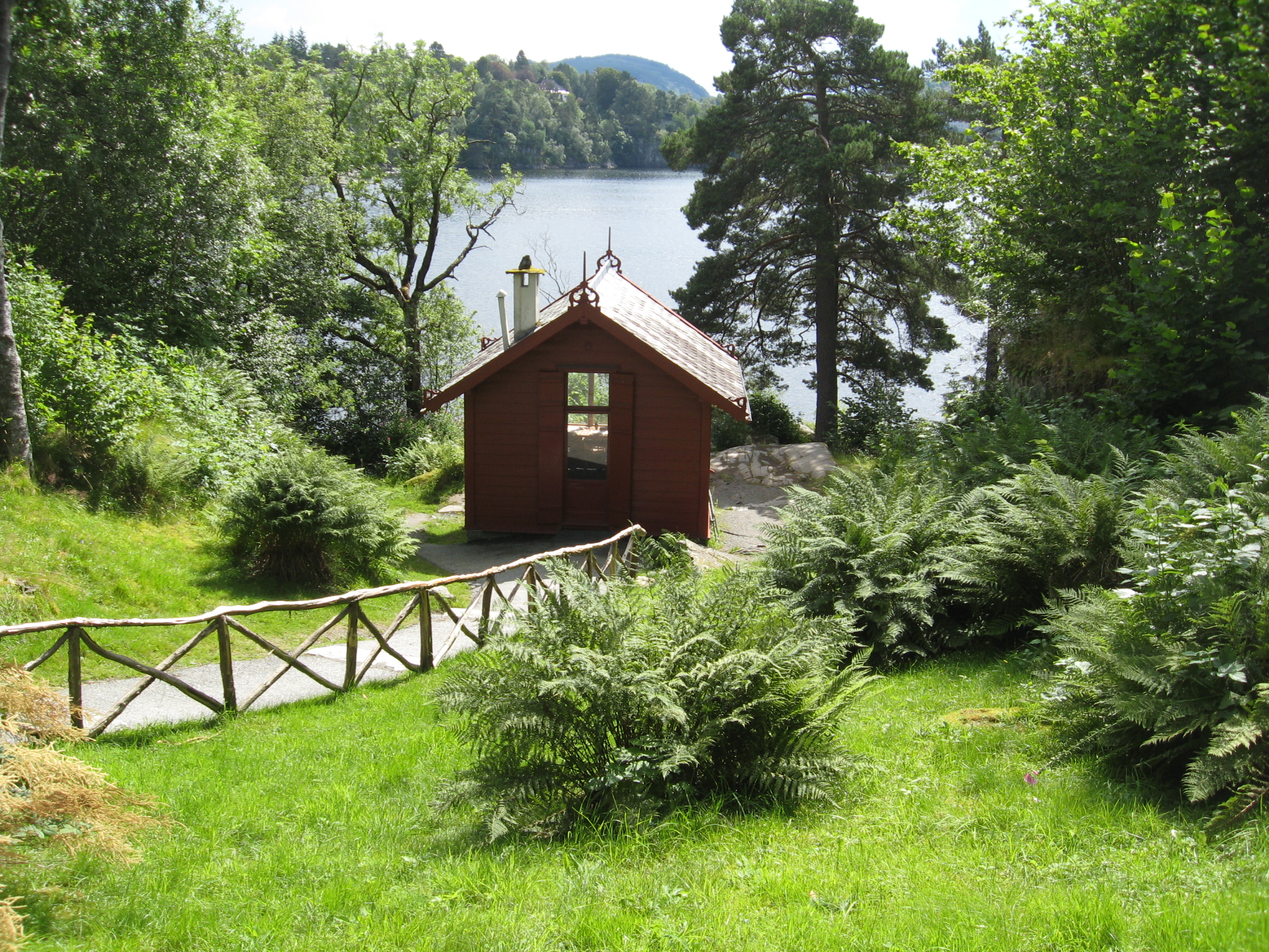 Дом у воды